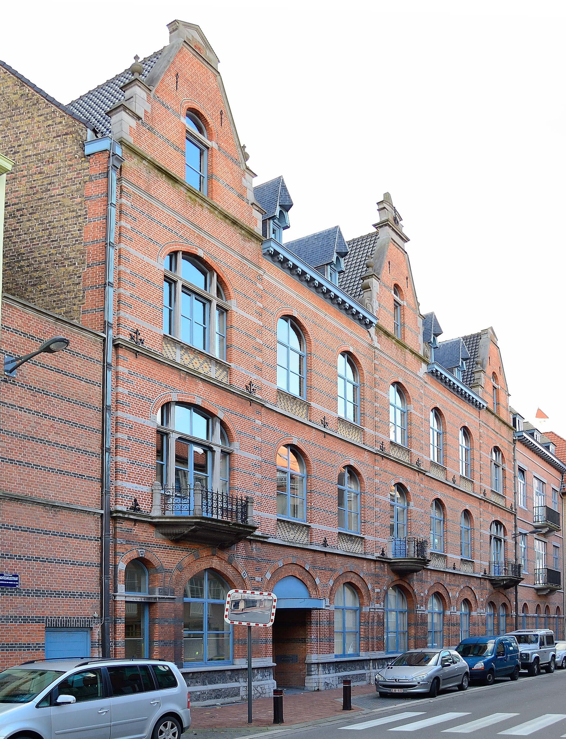 Gebouw van deKunstAcademie te 8300 Knokke-Heist, België, gelegen aan de Sebastiaan Nachtegaelestraat 8-10, voorheen het "Grand Hôtel de la Couronne".